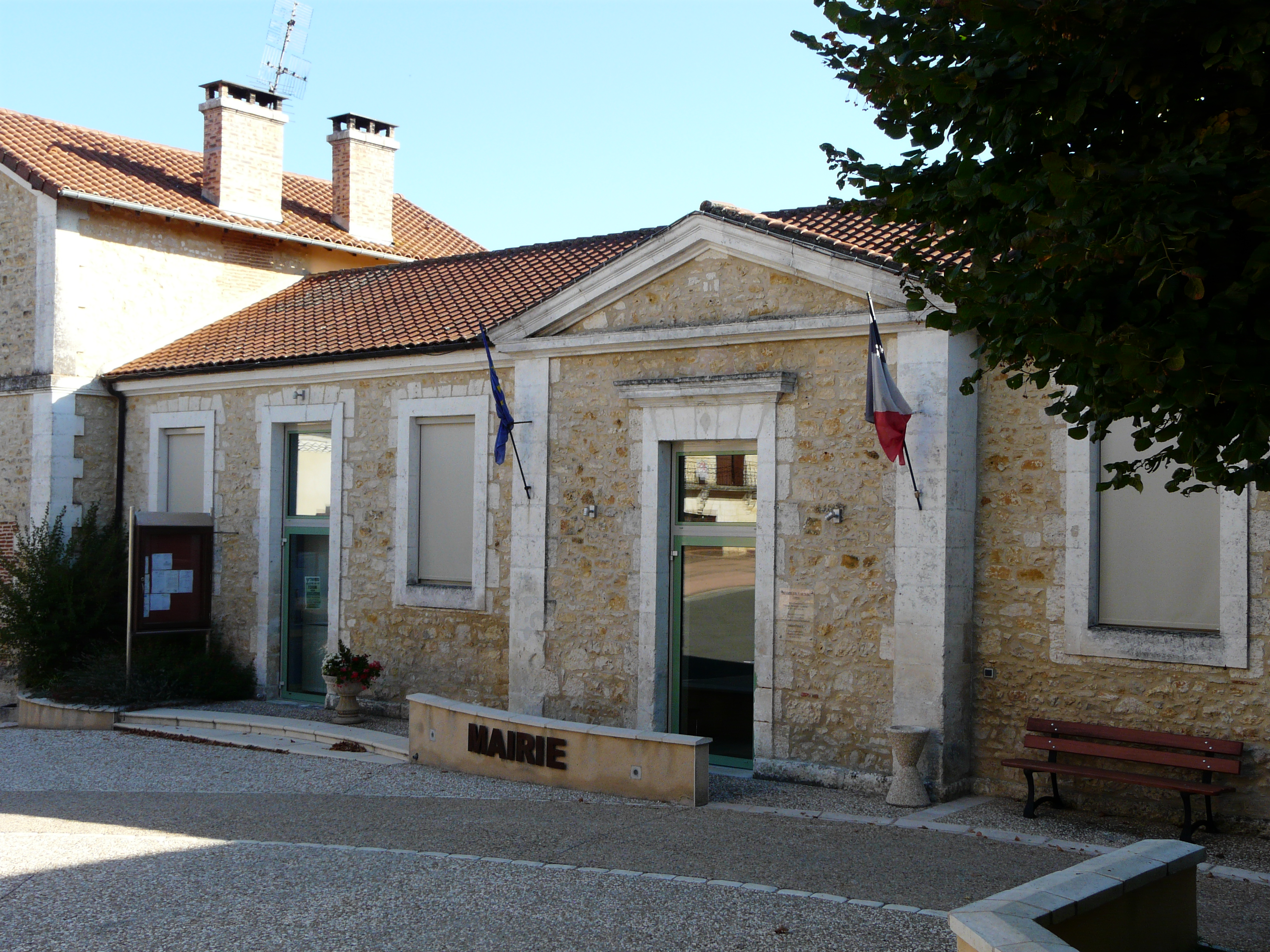 La mairie de Vaunac, Dordogne, France.